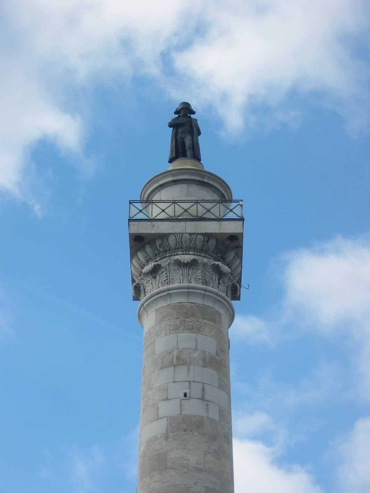 Napoleon, Collonne de la grande armée, Boulogne-sur-mer